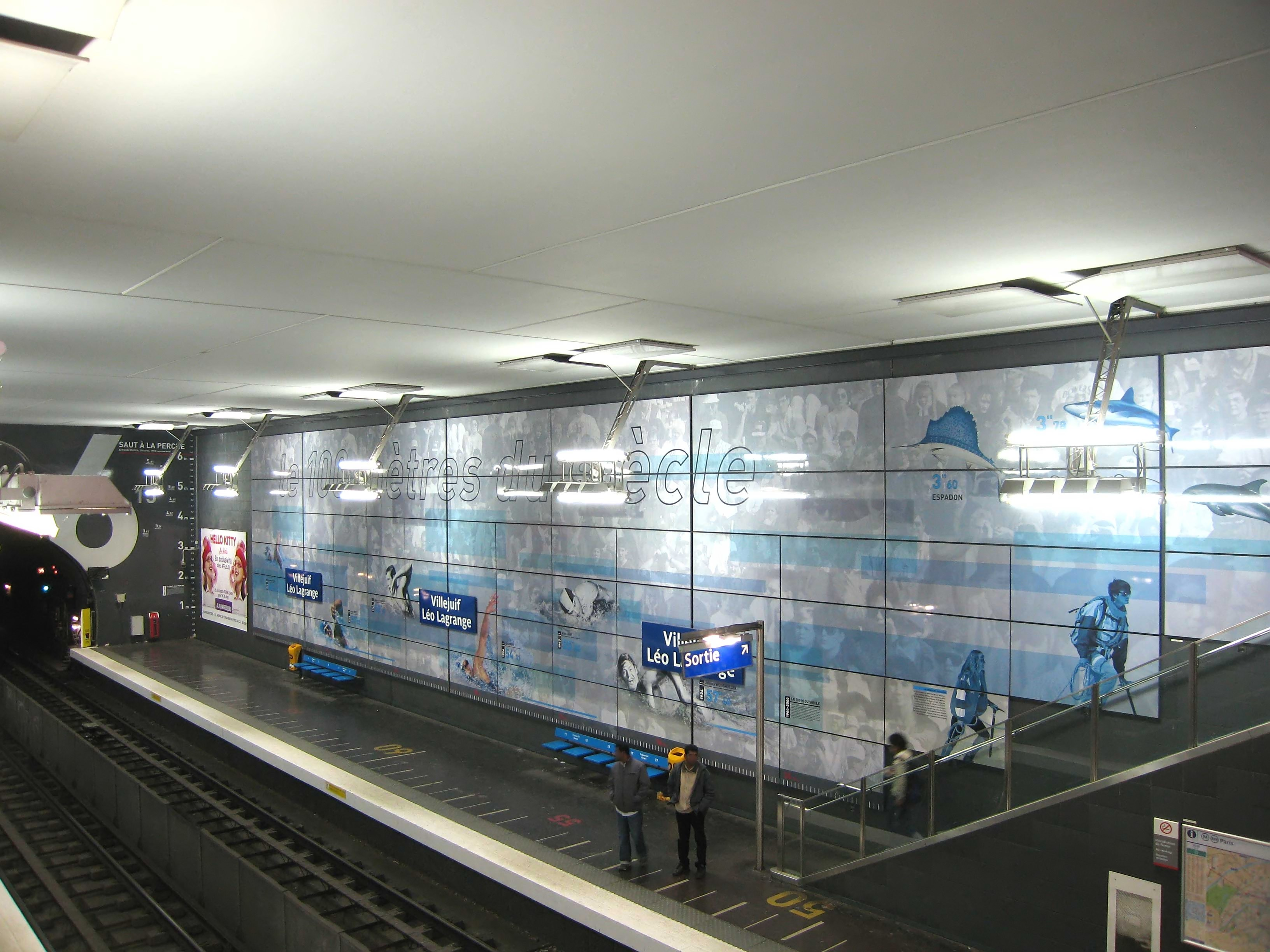 Métro de Paris, Station Villejuif Léo Lagrange (ligne 7), Paris, France